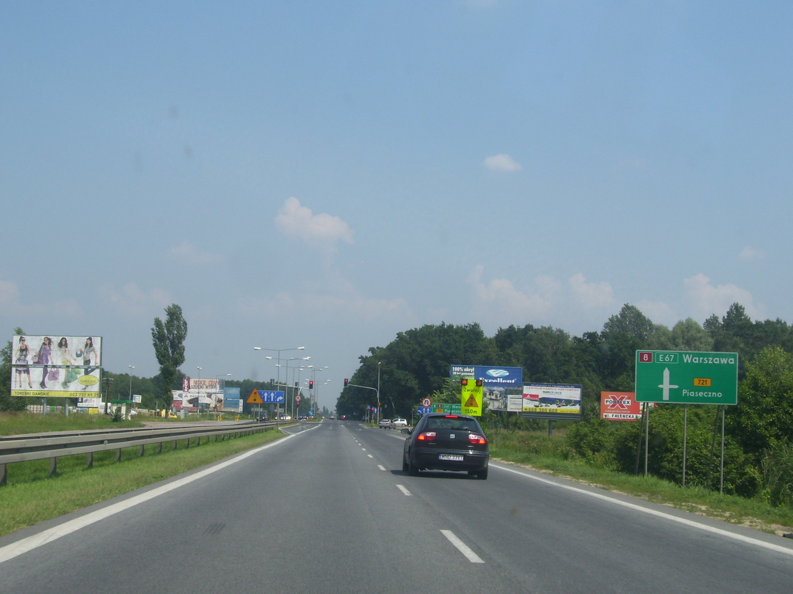 Droga krajowa nr 8 na skrzyżowaniu z drogą nr 721.